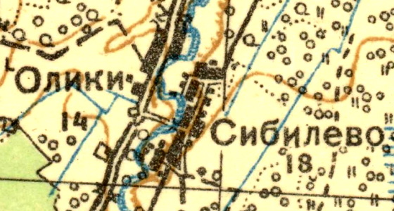 Топографическая карта Ленинградской области, квадрат О-35-12-Г (Ропша), деревня Олики